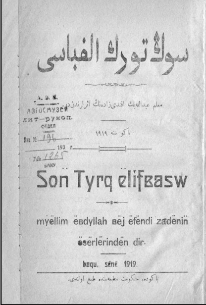 Abdullah Bey Efendizade tarafından 1919 yılında telgraf için geliştirilmiş Latin temelli Azeri yazısını tanıtan kitap.